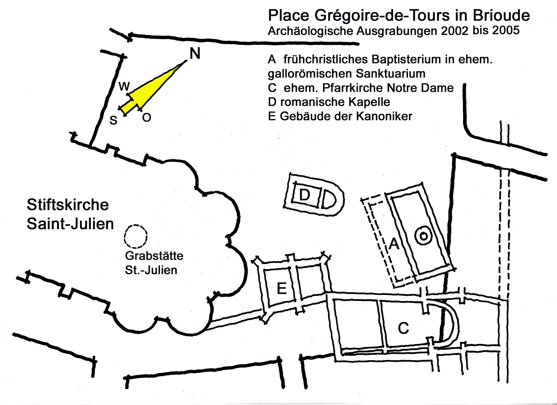 Saint-Julien Brioude, Ausgrabungen 2002 - 2005, nordöstlich der Kirche, Handskizze